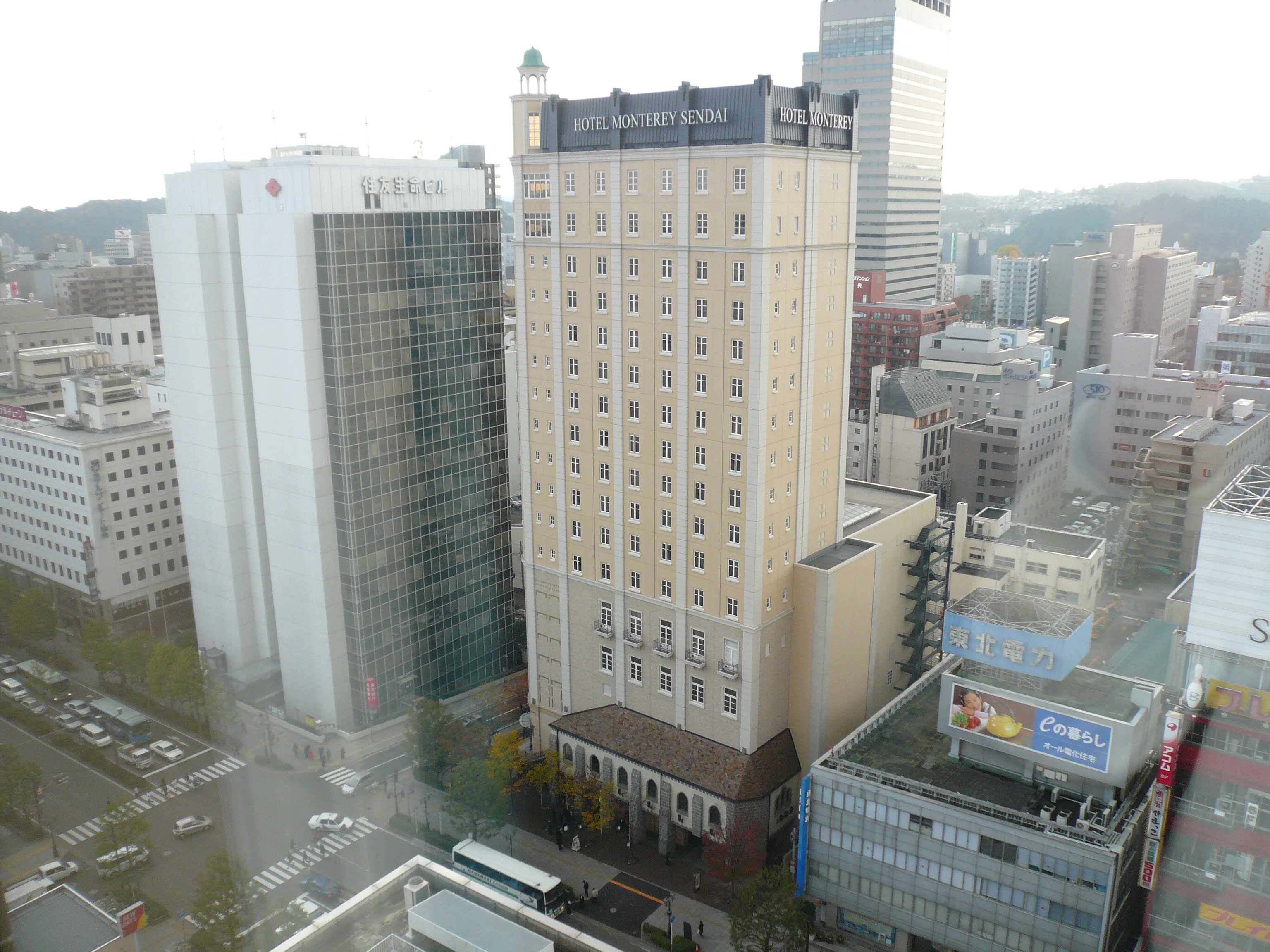 Hotel Monterey Sendai(ホテルモントレー仙台)